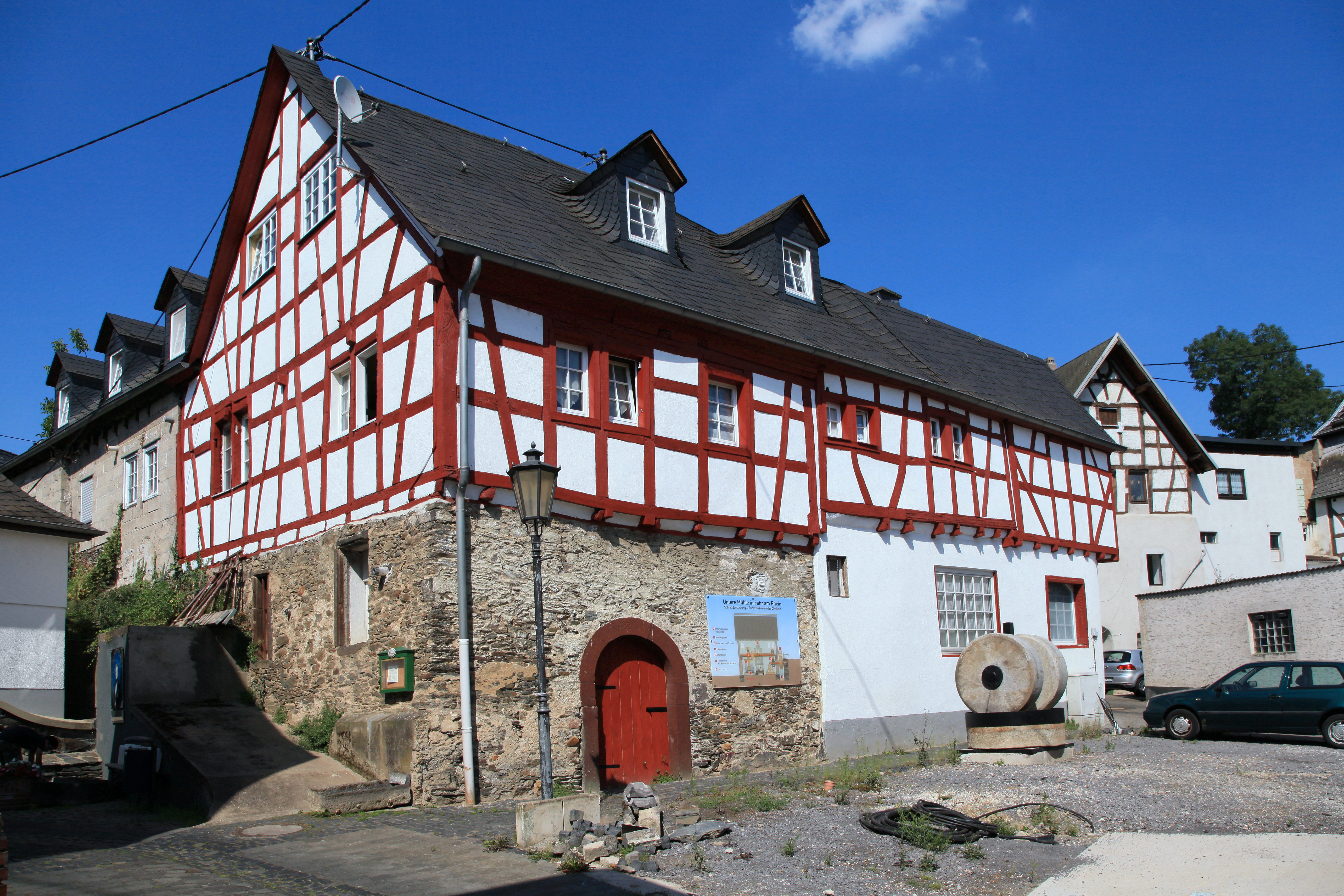 Fahrer Straße 77 mit Kollergang und Schild zur Unteren Mühle, Fahrer Straße 79 in Neuwied